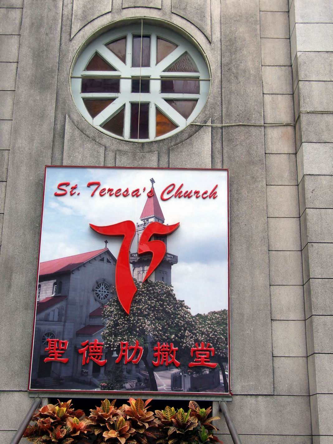 聖德肋撒堂慶祝建堂75週年